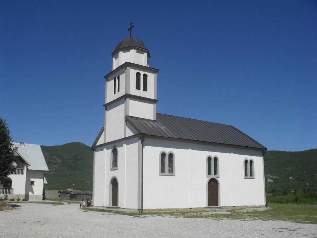 Pravoslavna crkva Uznesenja Gospodnjeg u Gračacu.